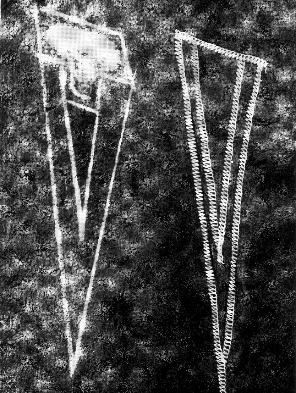 Nähte in der Kürschnerei: Absatz „Anbrachen, “Bildunterschrift „Doppelzunge“